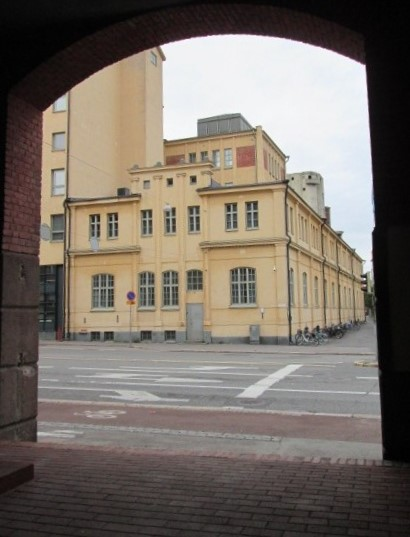 Osuusliikkeiden ja teollisuuden Sörnäinen